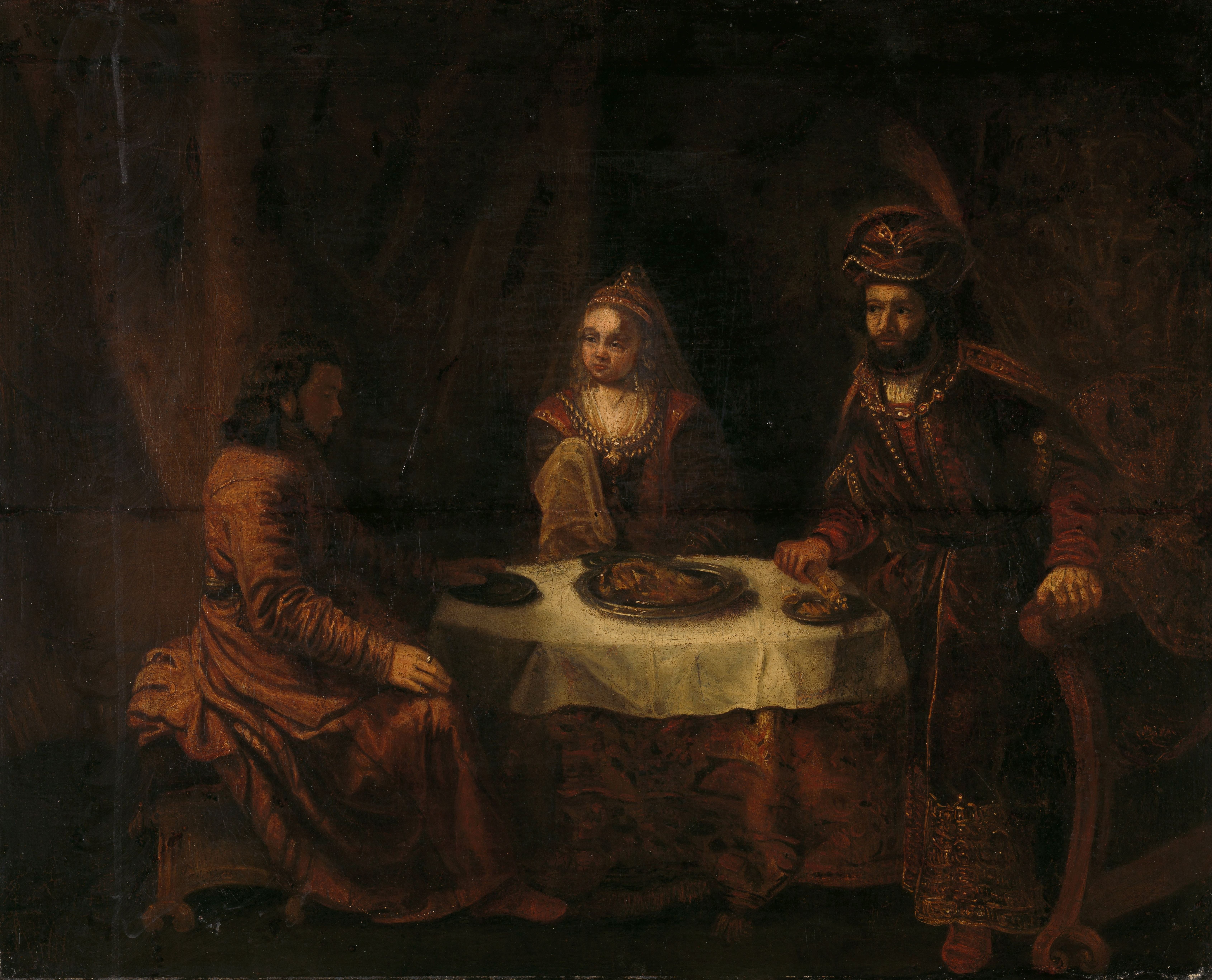 De woede van Ahasverus. Koning Ahasverus staat woedend van tafel op, in het midden Esther en links Haman.